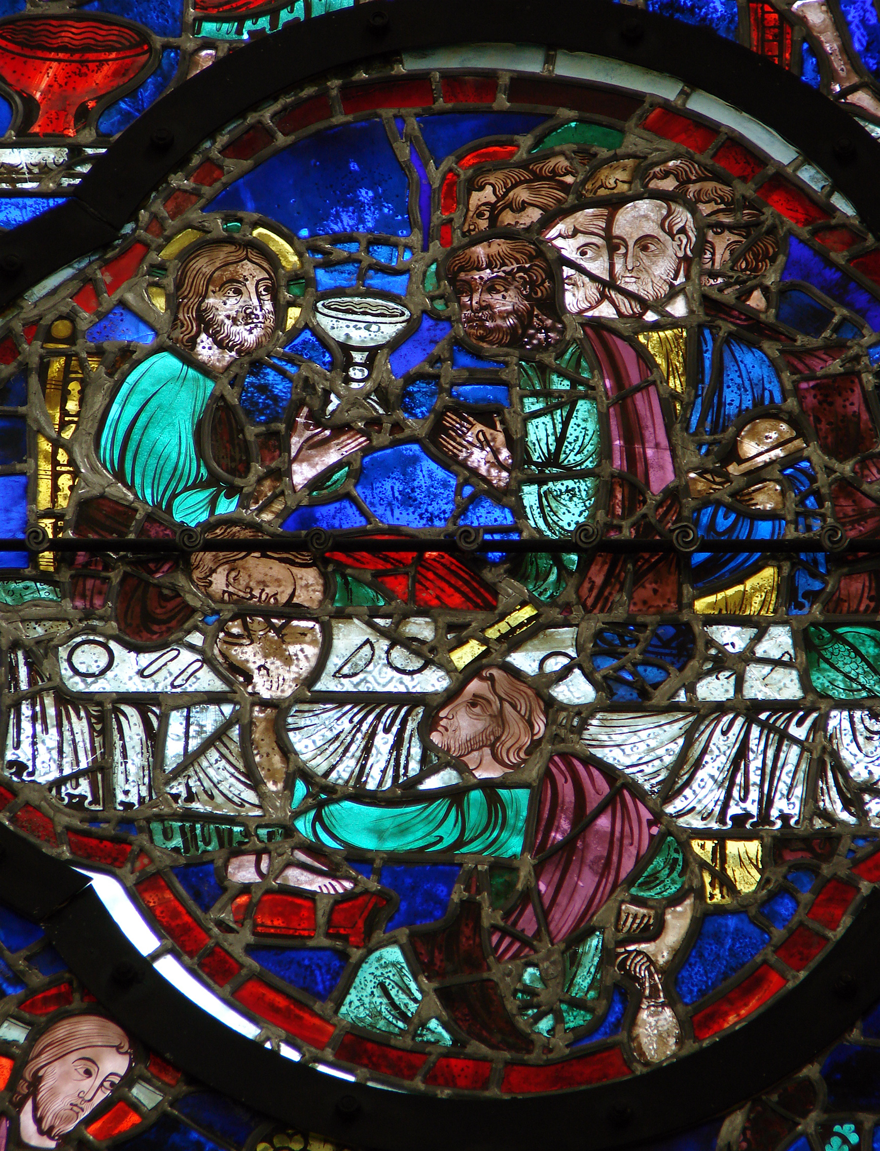 Baie centrale du choeur de la cathédrale Notre-Dame de Laon, vers 1215. Détail: la Cène, avec Judas au premier plan.